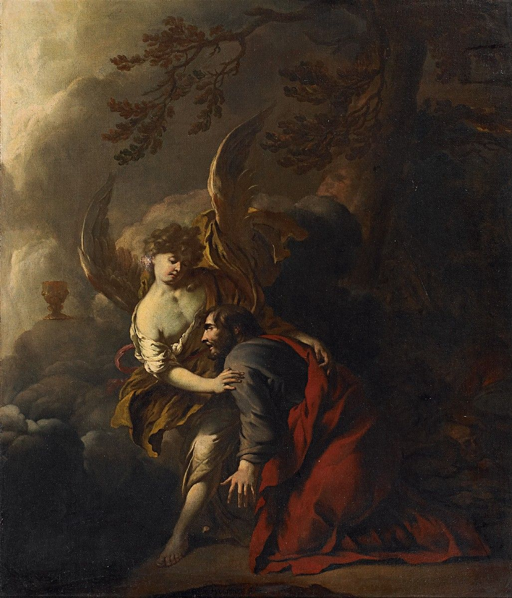 Tobias und der Engel